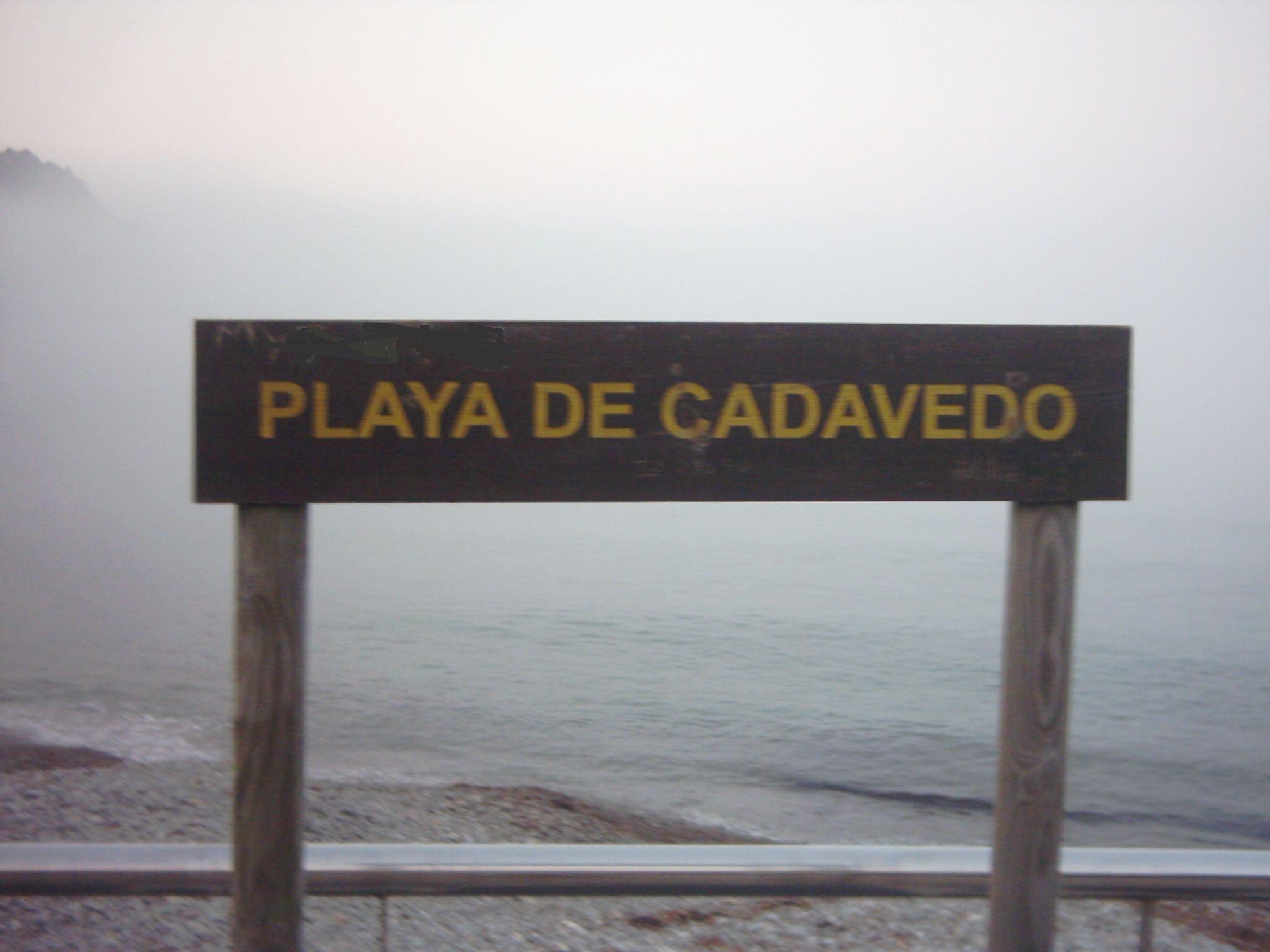 Playa de Cadavedo en Asturias.